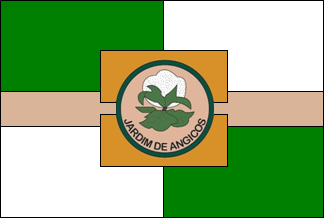 Bandeira de Jardim de Angicos, Rio Grande do Norte, Brasil.